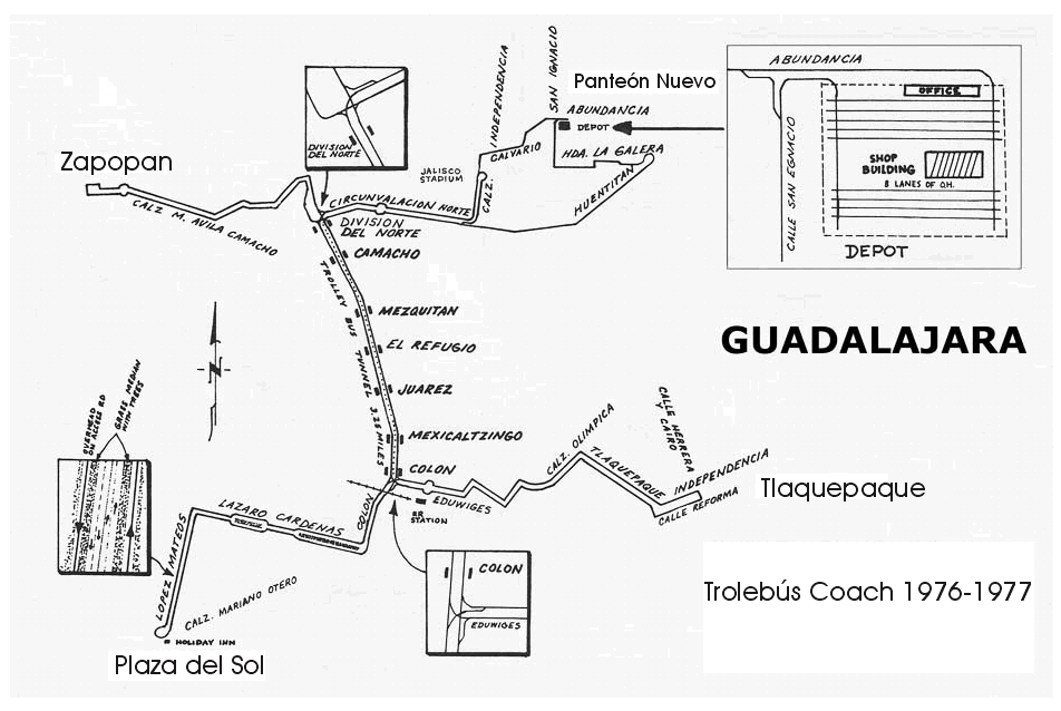 Mapa del Trolebus de guadalajara del año 1976